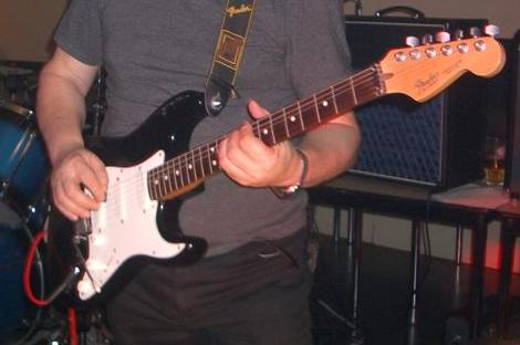 Een zwarte Strat Plus uit 1989 in actie.